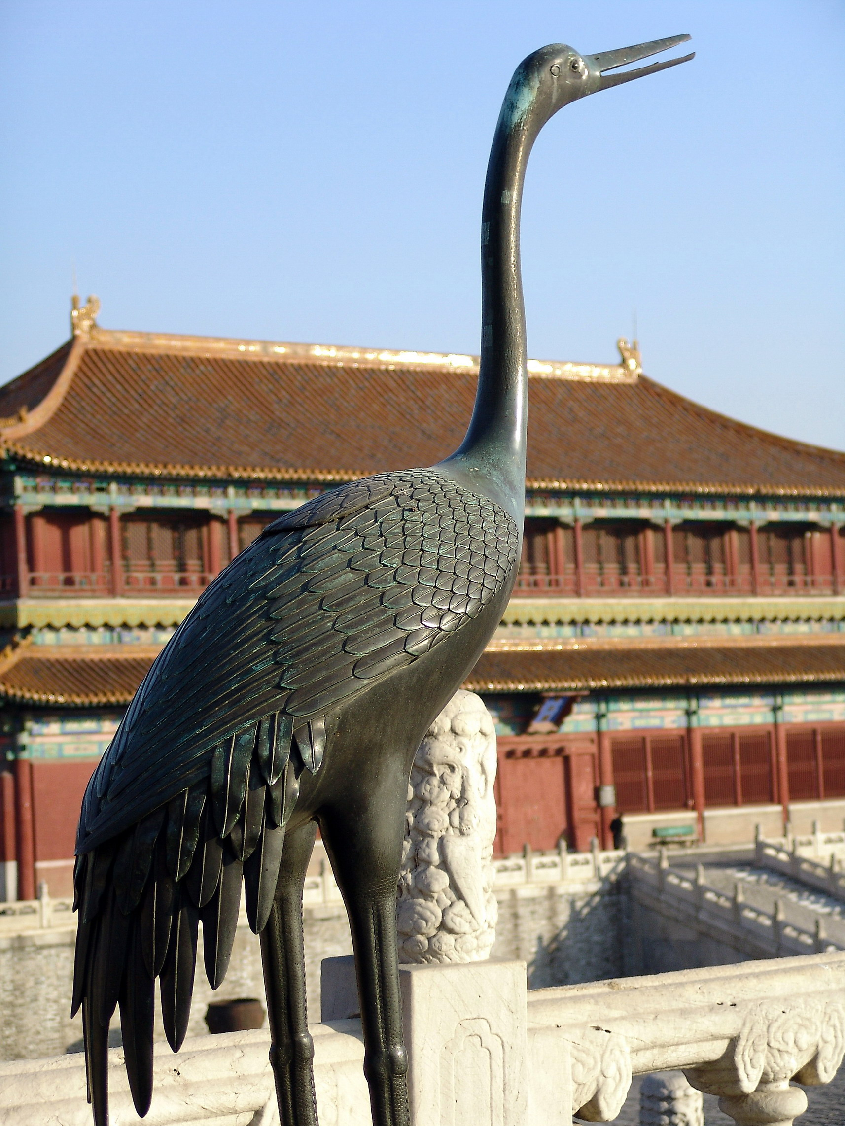 Forbidden City